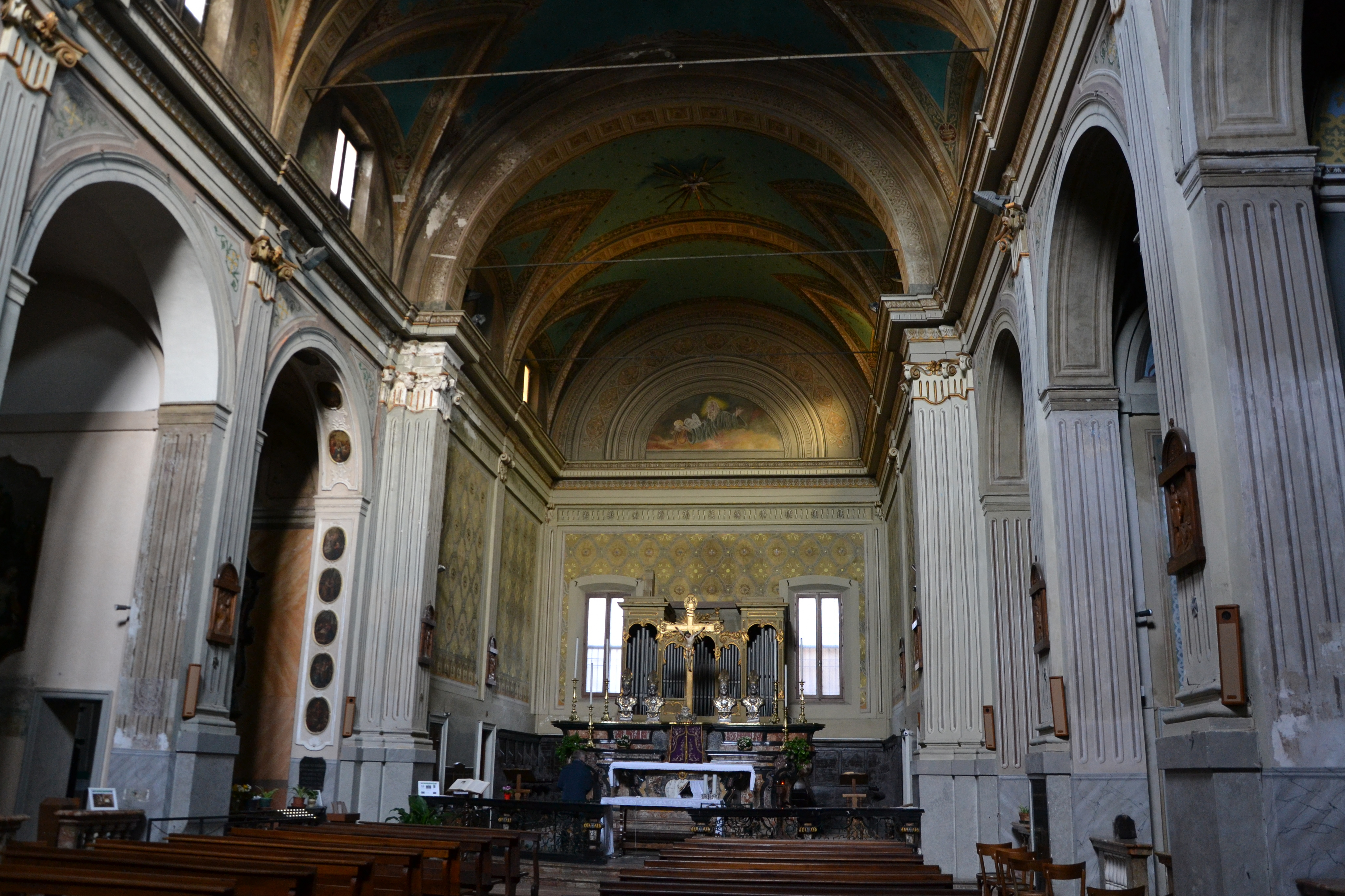 San Giovanni Domnarum (Pavia)